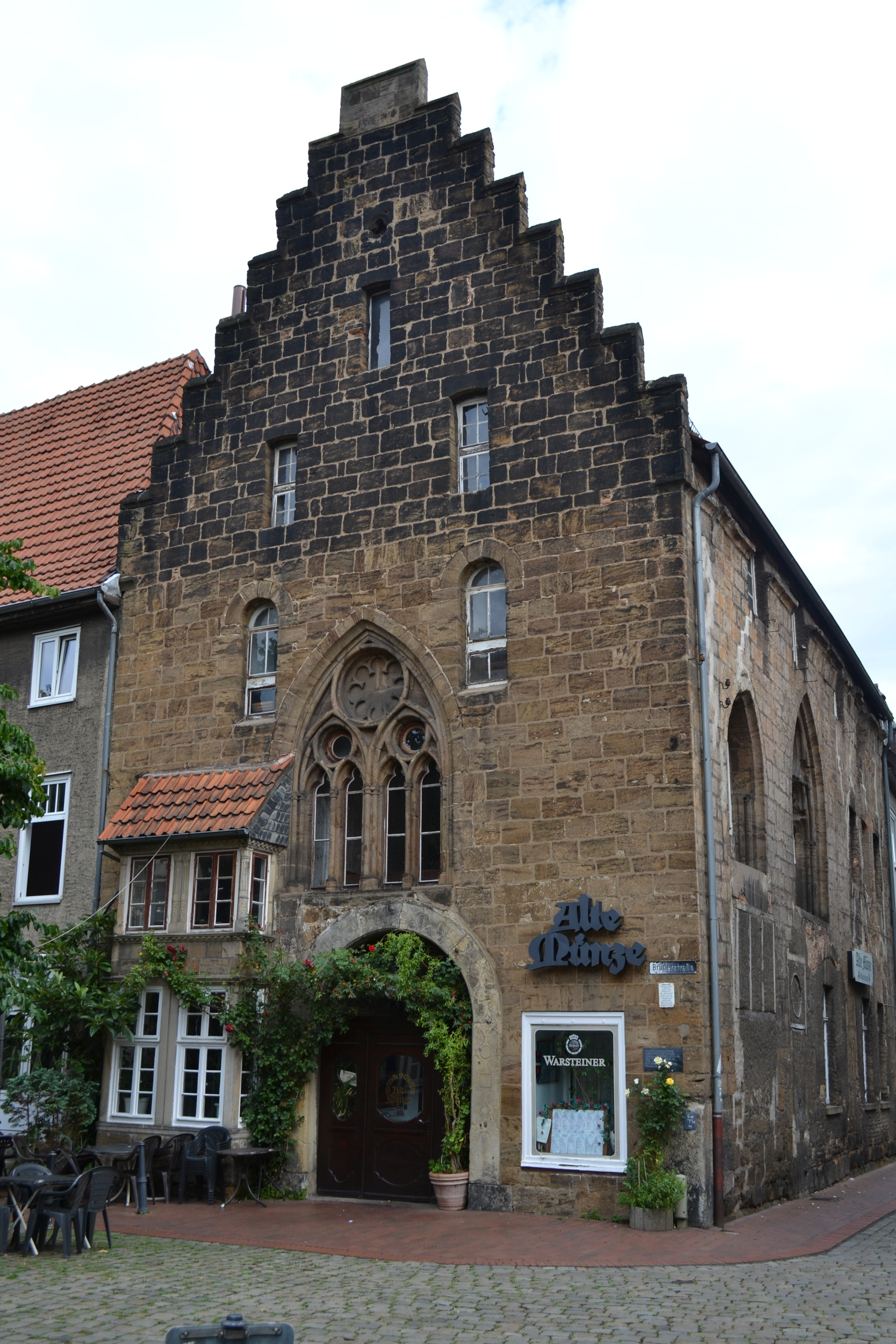 Alte Münze in der ostwestfälischen Stadt Minden (Westf.)